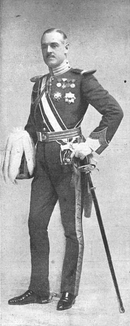 El Excmo. Sr. Conde de la Cimera. Propietario de admirables caballos de carreras.—Fot. Kaulak